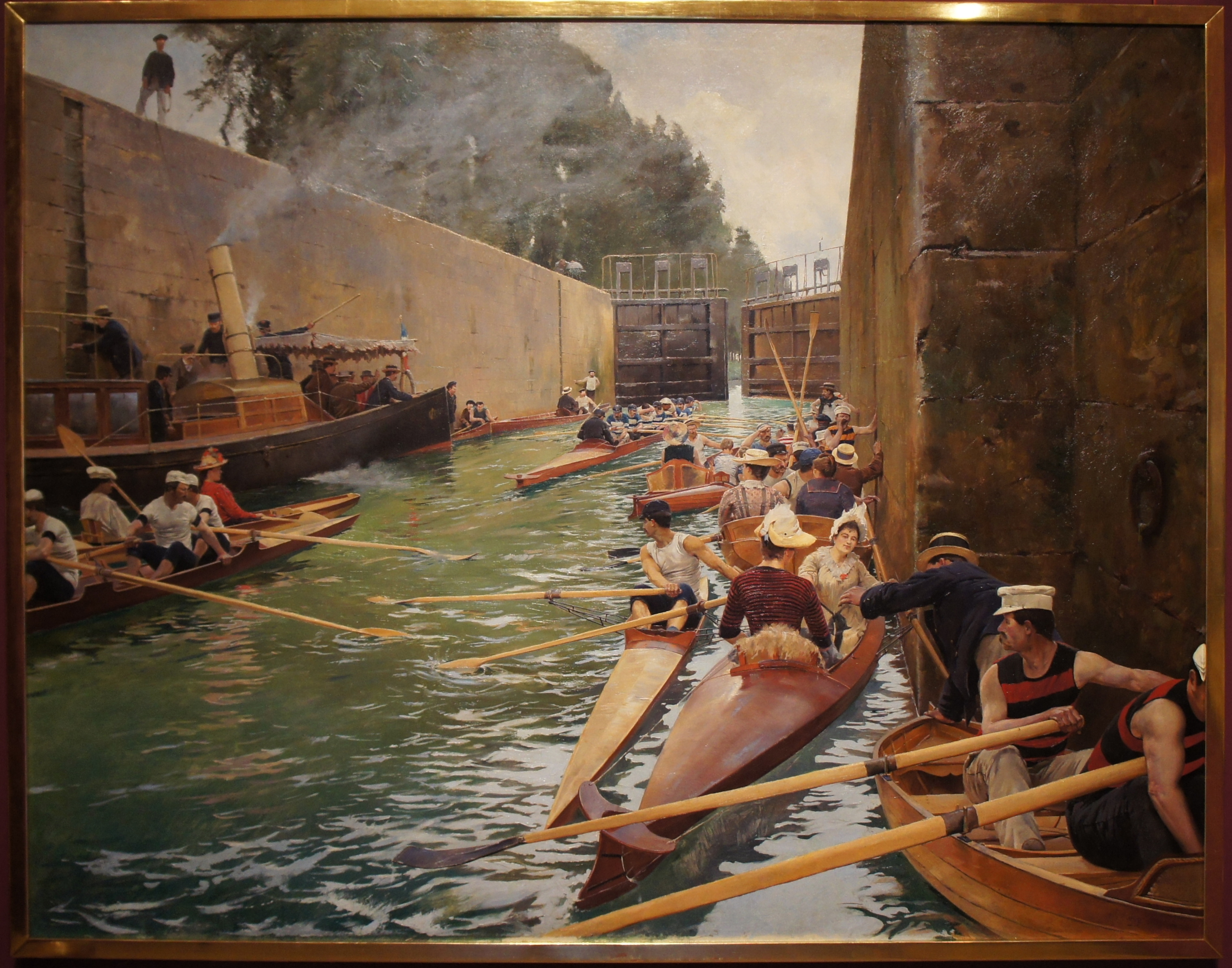 L'Eclusée, Musée des beaux-arts de Reims, legs Henri Vasnier de 1907, inv 907.19.121